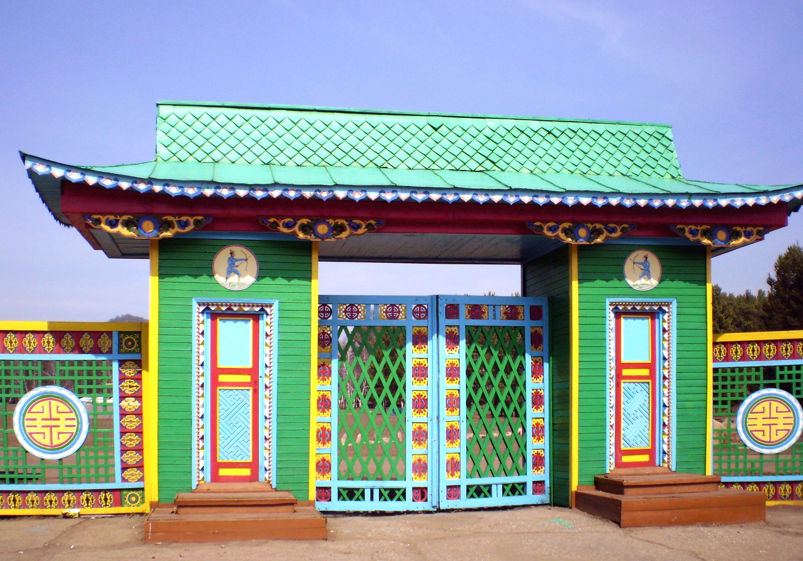 Ворота этнографического музея